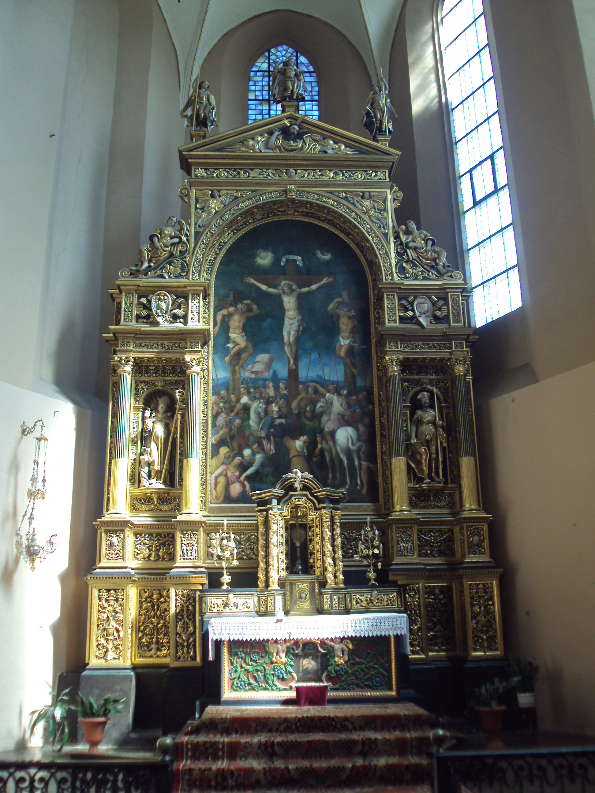 Bodzentyn kościół - ołtarz główny